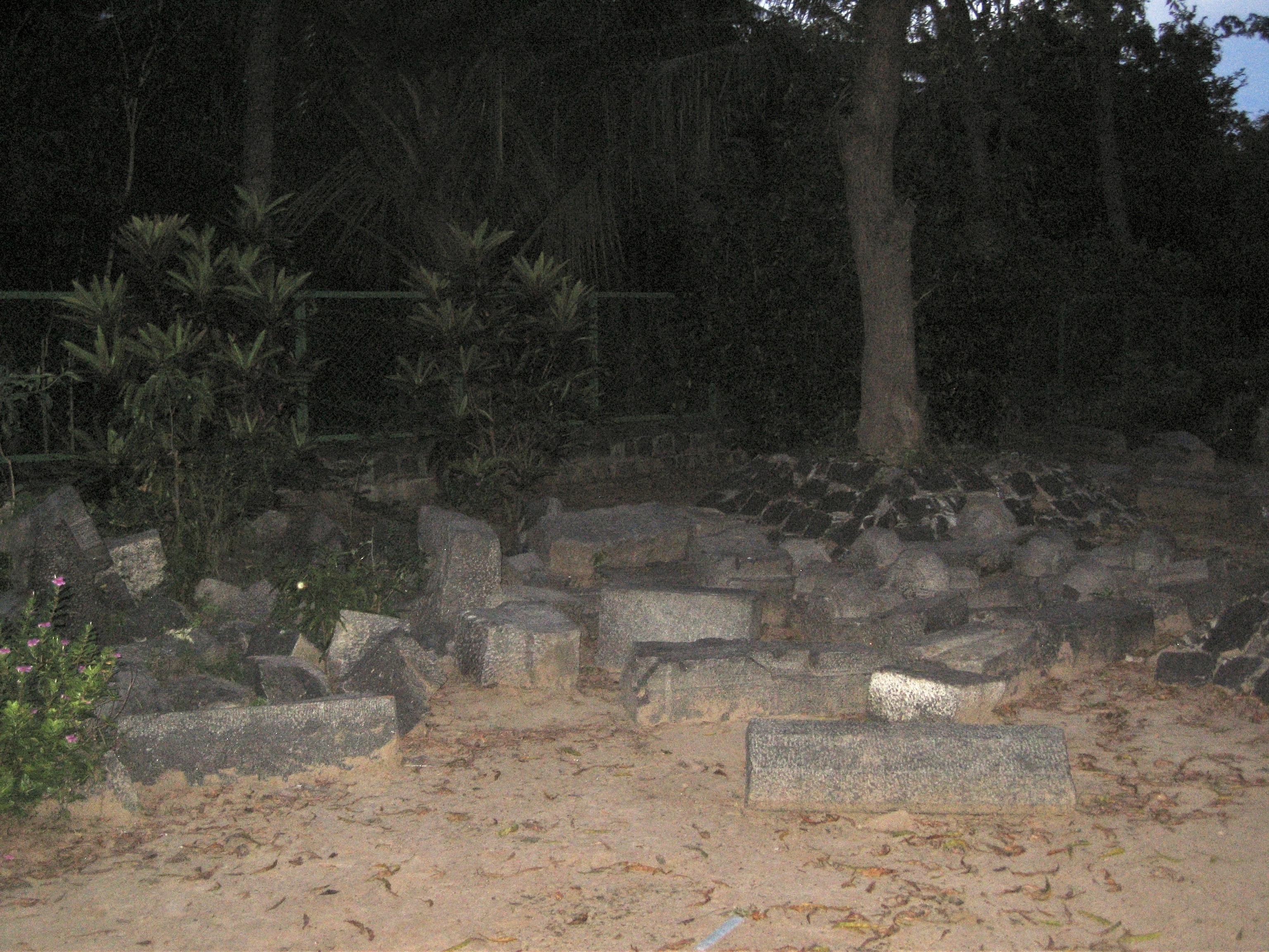 சிதறிக் கிடக்கும் கல்வெட்டு ஆதாரங்கள்.